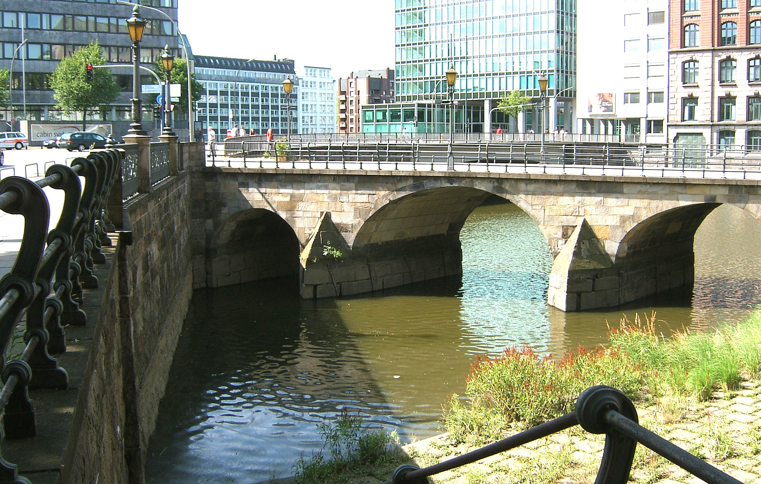 Die Zollenbrücke, die das frühere Gröningerstraßenfleet überbrückte, wurde erstmals 1355 erwähnt und ist damit die älteste Fleetbrücke Hamburgs. Das Geländer links stammt von Otto S. Runge und war 1835 für die Graskellerbrücke gestaltet worden. This is a photograph of an architectural monument. und 12414